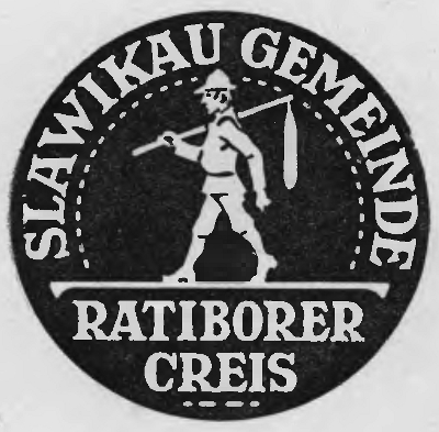 Altes Siegel der Gemeinde Slawikau im Landkreis Ratibor.